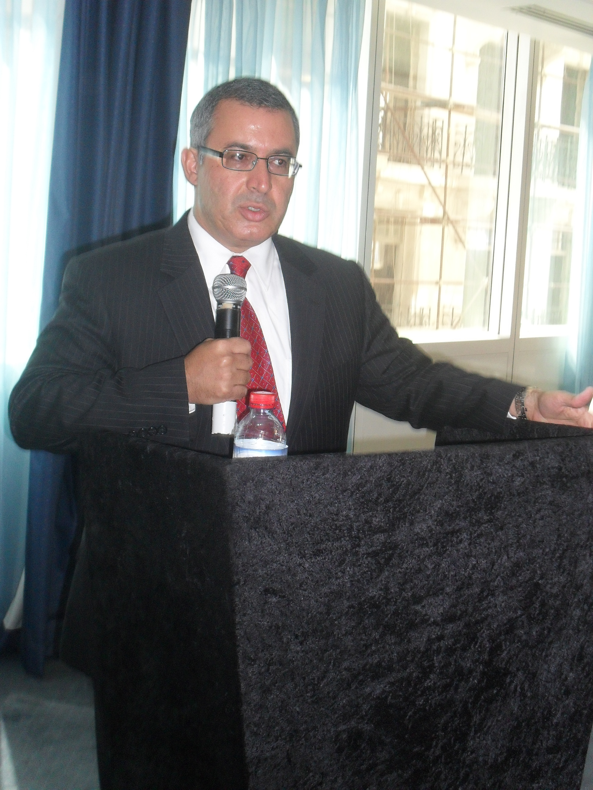 [Houda Trabelsi] Despite years of tyranny, Tunisians are able "to weave a social fabric based on dialogue", says NGO chief Radwan Masmoudi. على الرغم من سنوات الاستبداد، فإن التونسيين قادرون على بناء نسيج اجتماعي يرتكز إلى الحوار، حسب رئيس إحدى المنظمات غير الحكومية رضوان المصمودي En dépit d'années de tyrannie, les Tunisiens sont capables de "tisser un tissu social fondé sur le dialogue", déclare Radwan Masmoudi, responsable d'une ONG.